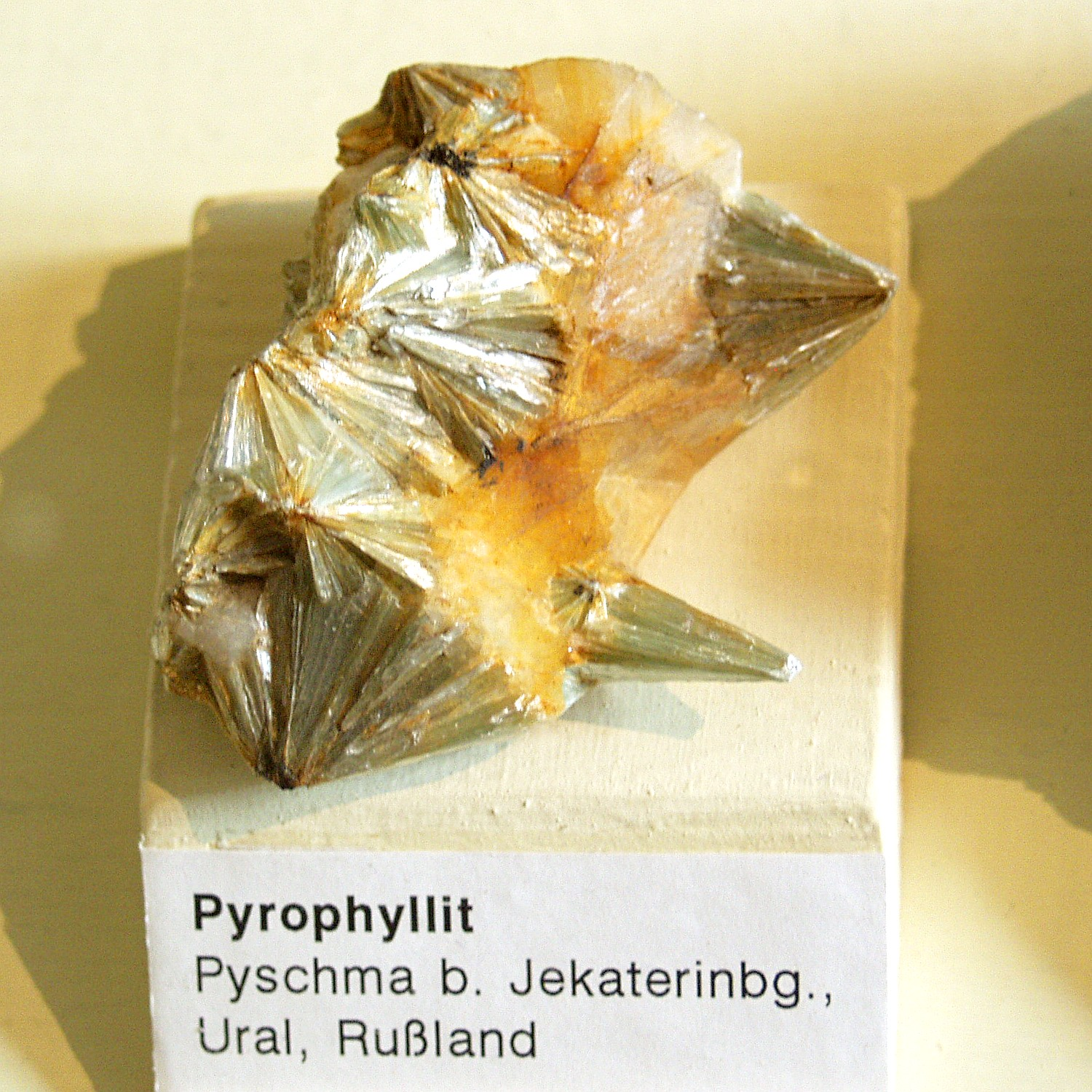 Pyrophyllit, Pyschma bei Jekatarinenburg, Ural, Rußland. Museum für Naturkunde (Berlin).